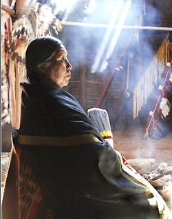 Vanessa Paukeigope Jennings, Kiowa Regalia Maker